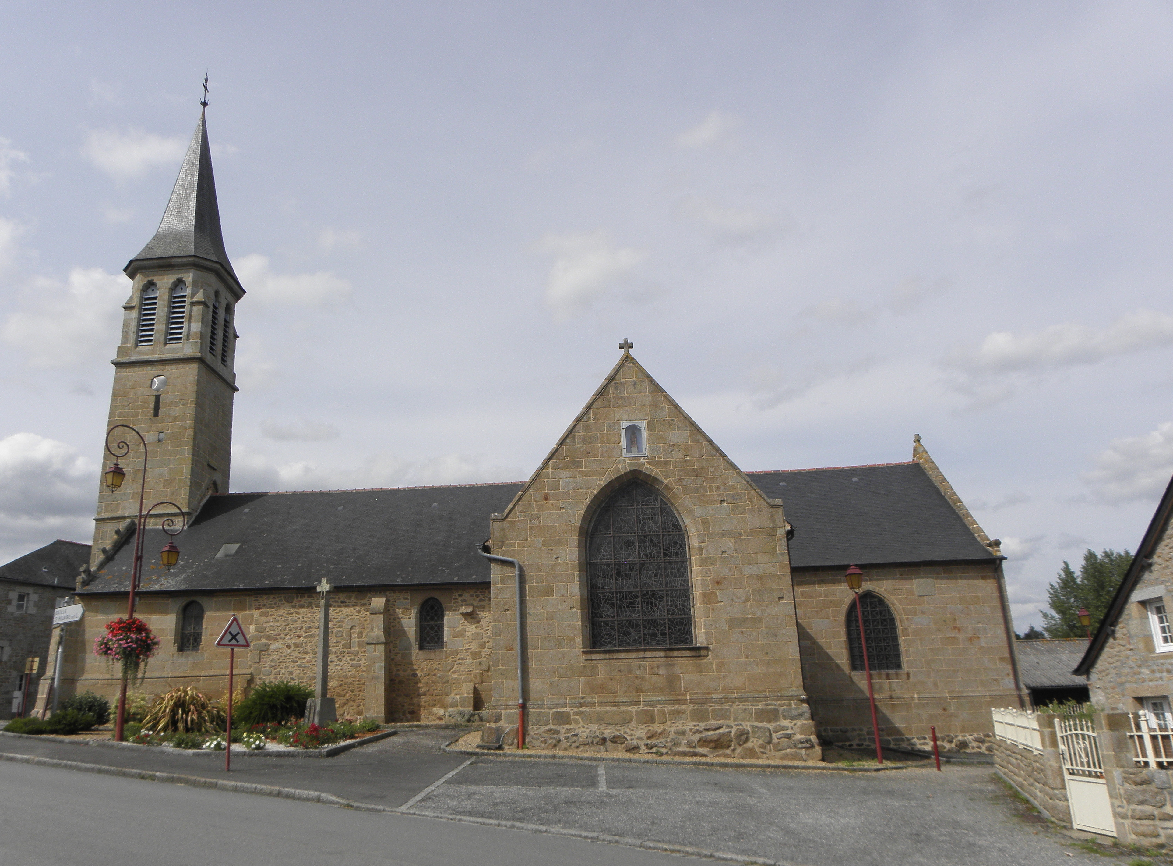 Extérieur de l'église Saint-Marc (anciennement Saint-Médard) de Saint-Marc-le-Blanc (35). Vue méridionale.